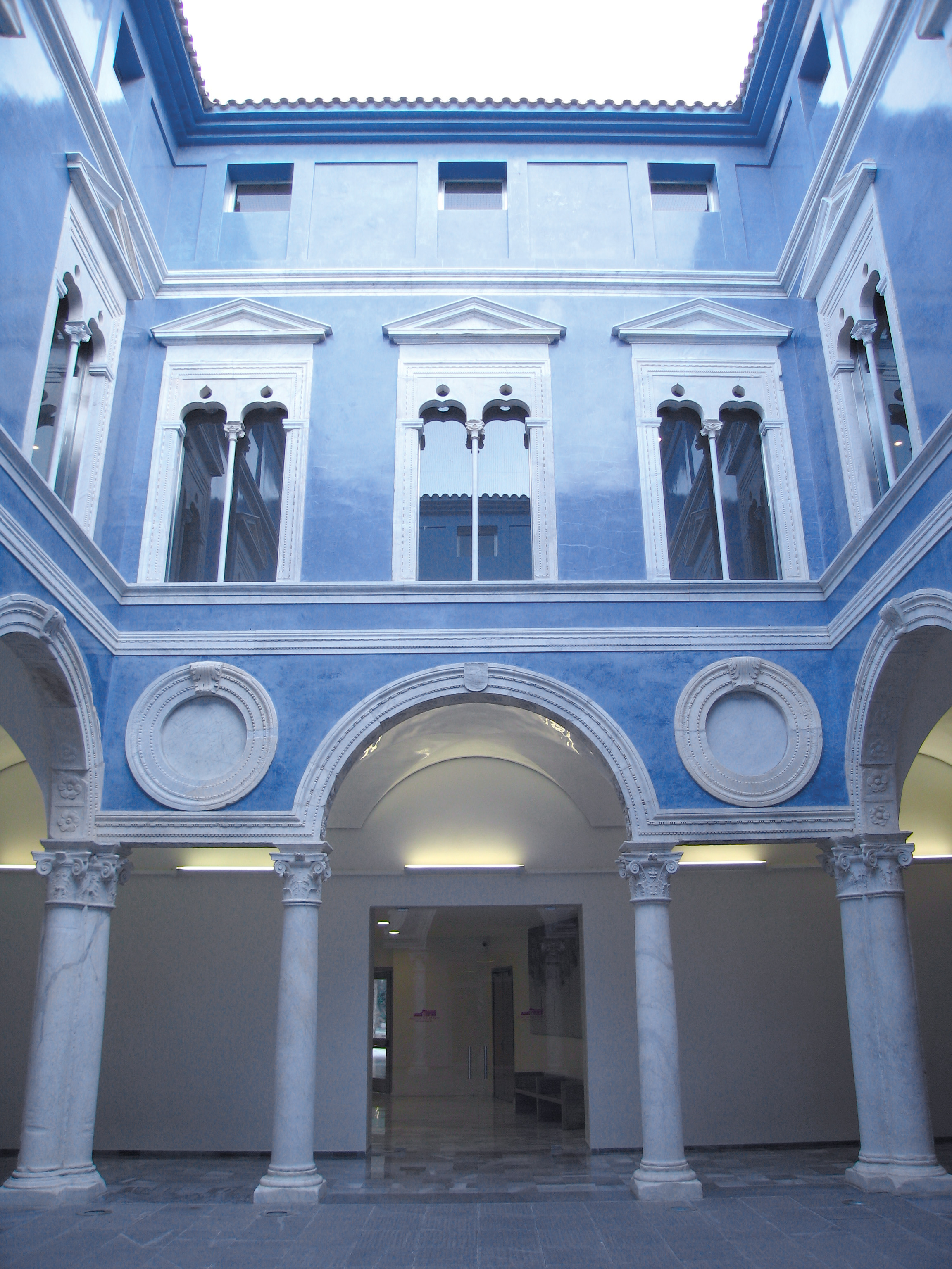 Pati de l'Ambaixador Vich, sant pius V (València)